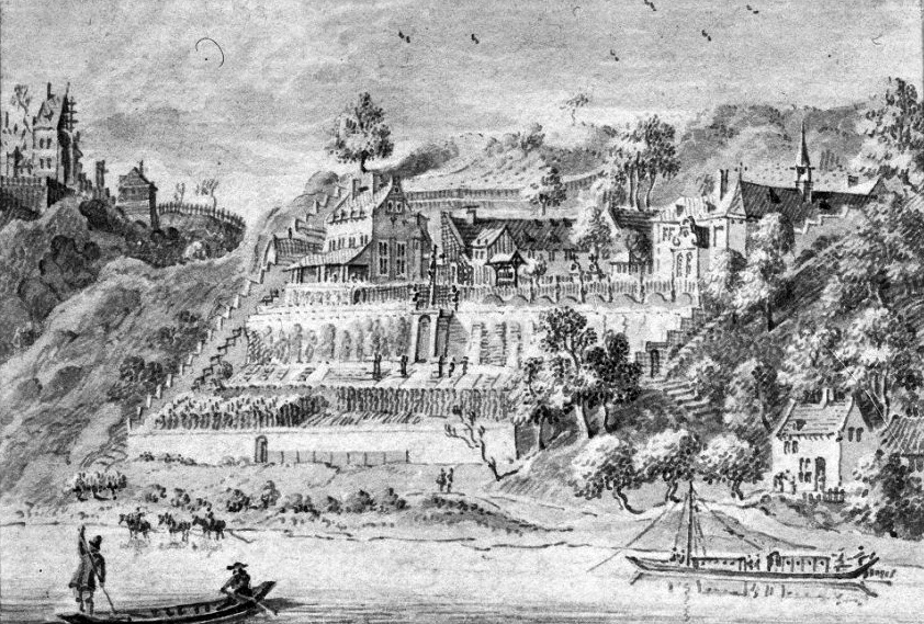 Voormalig Franciscanerklooster: slavante reproductie J.de Beyer 1740